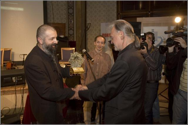 Tarr Béla filmrendező, forgatókönyvíró átveszi Párhuzamos Kultúráért díjat Hartyándi Jenőtől, a MEDIAWAVE Alapítvány vezetőjétől